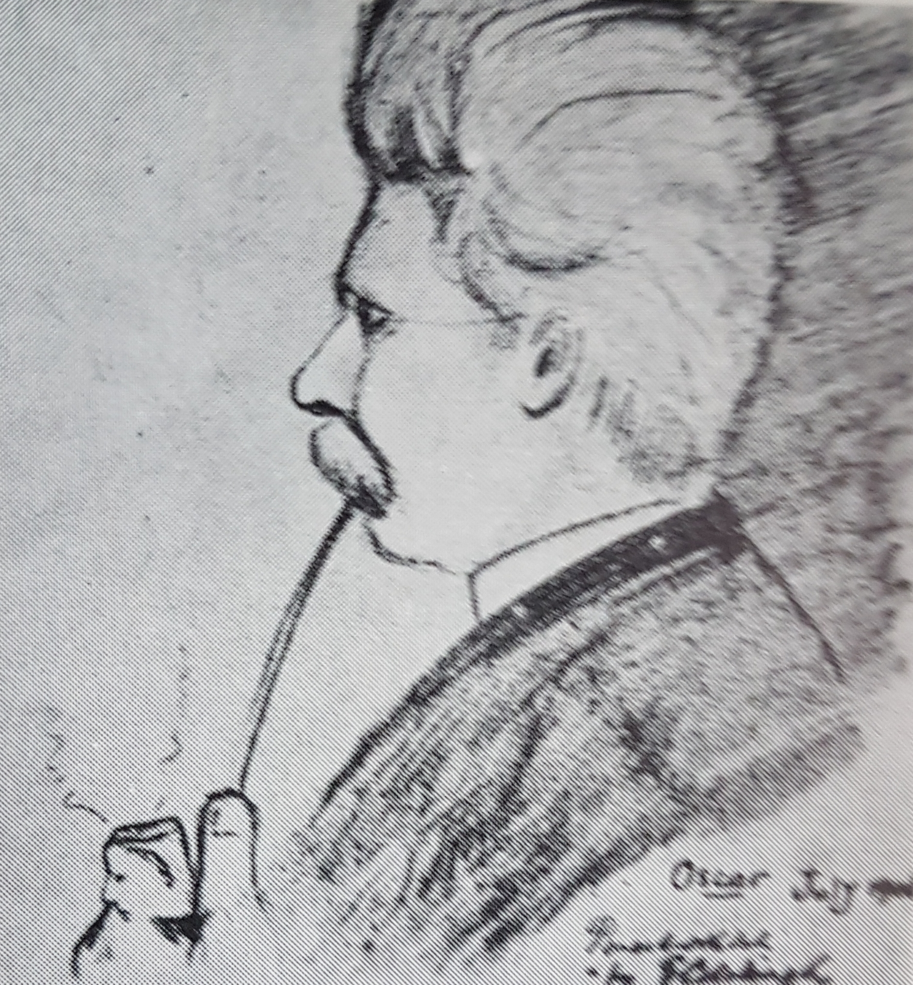 Oscar Friström, avfotograferad porträttbild från Allhems Svenskt konstnärslexikon.